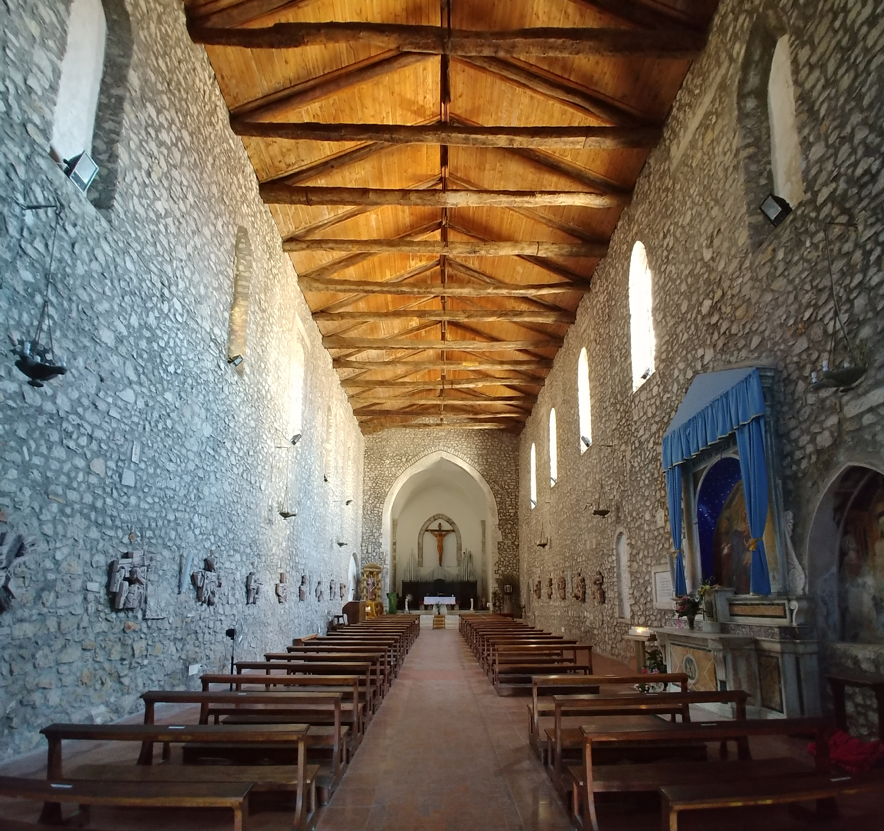 Interno.